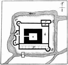 Falkenaun linnoitettu luostari Virossa, perustettu ennen vuotta 1234. Piirros Brotzen kokoelmasta Riian kaupunginkirjastossa.A—B 150, A—C 130 askeltaa, portin esilinna (Zwinger); b, Torni; c, Torni, varhainen, siinä vankila; d, torni, todennäk. myöhäinen; e, luostarinkirkko, gootilaisajalta; f, kirkon esilinna (Zwinger); g, munkkikoppeja; h, entinen luostarin puutarha; i, vesimylly.